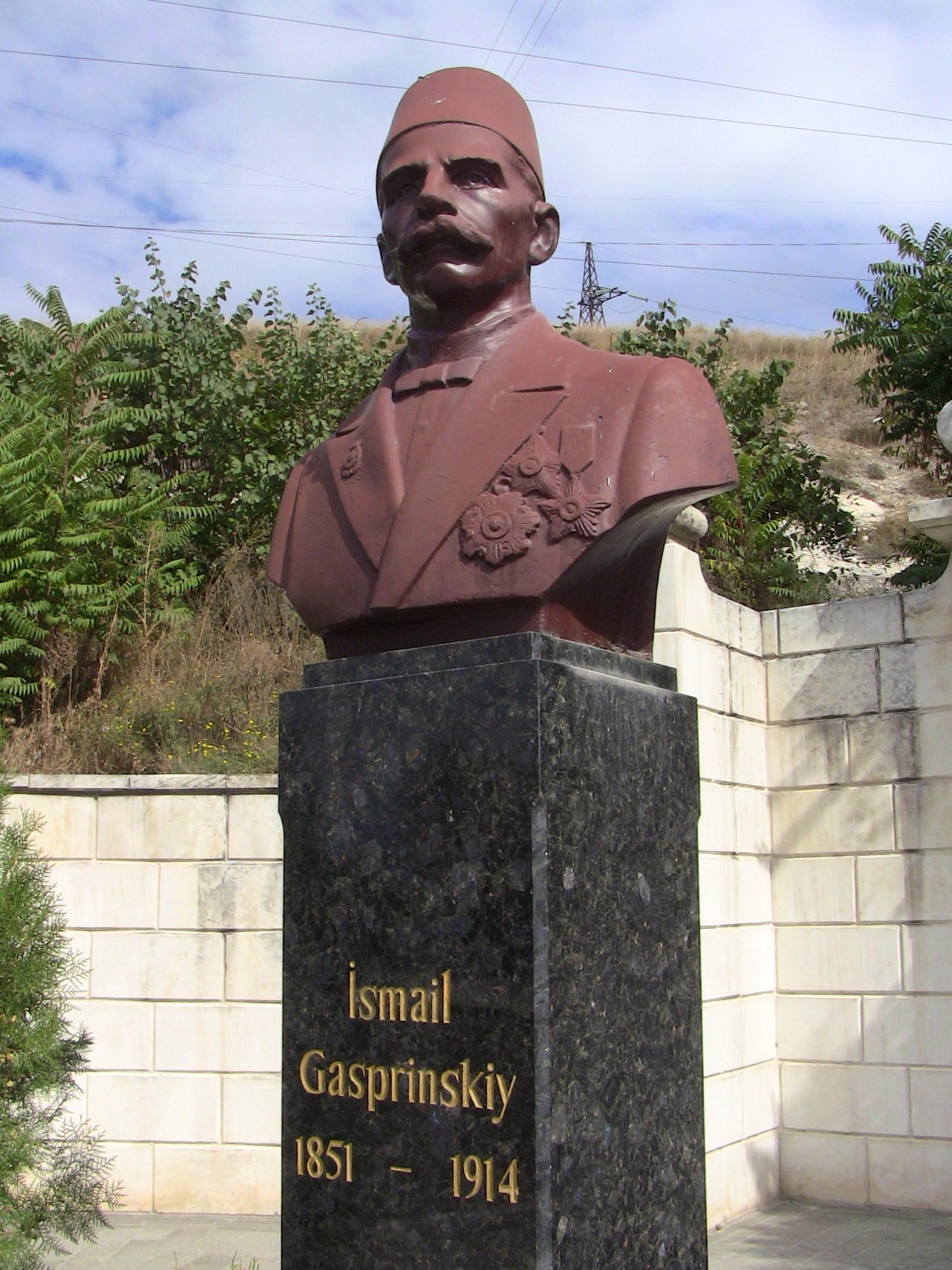 Гаспринский, Исмаил (бюст)